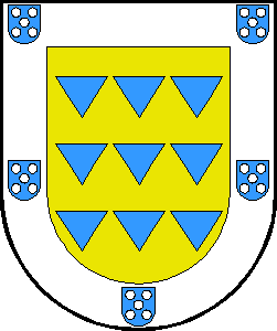 Escudo Heráldico del linaje Acuña